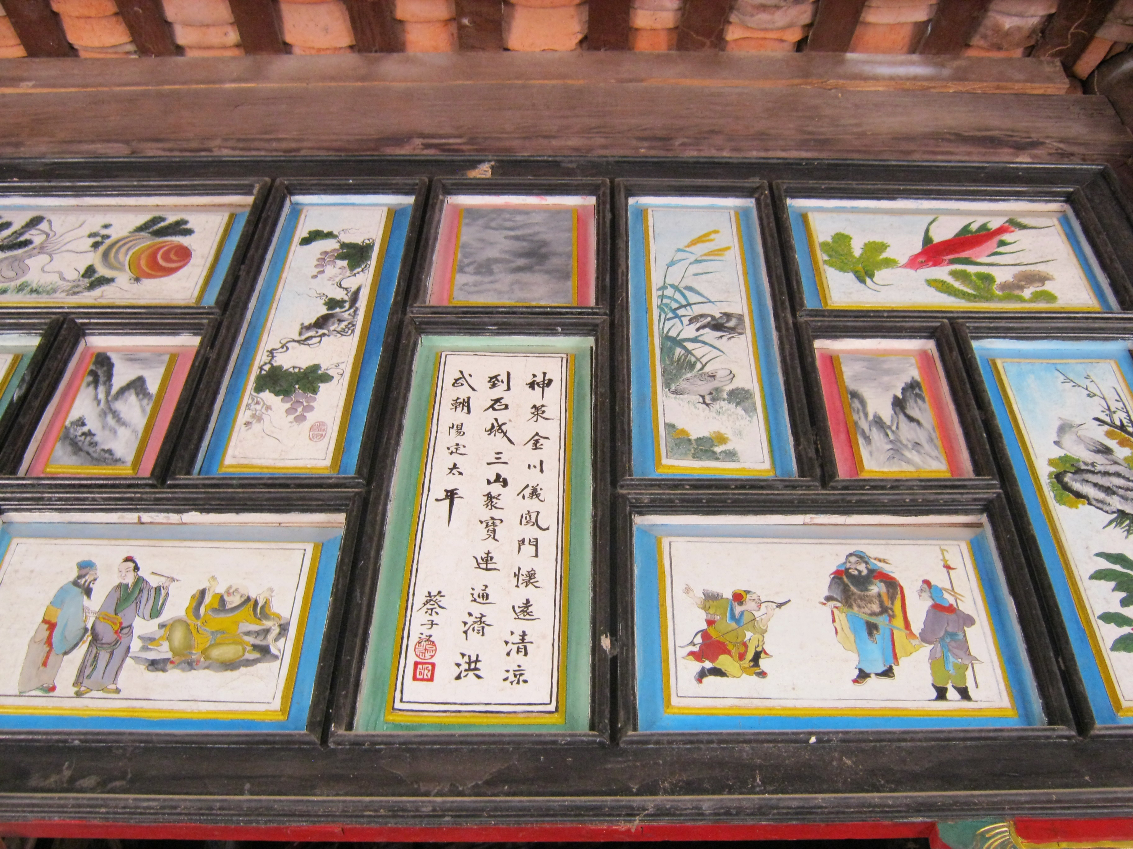 Tranh trong đình Định Yên, thuộc xã Định Yên, huyện Lấp Vò, tỉnh Đồng Tháp, Việt Nam.